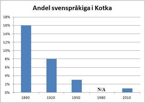 Kotkas svenskspråkiga befolkning har minskat från 16 % på 1890-talet (1920-talet 8 % och 1950-talet 3 %, idag ca 1 %) Källa: "Fram till 1902 var det officiella språket i Kotka svenska, varefter stadsförvaltningen godkändes som tvåspråkig, då även finskspråkiga arbetare blivit invalda. Tack vare arbetarrörelsen och generalstrejken 1905 fick den finskspråkiga majoriteten utökade rättigheter. År 1906 blev stadens officiella språk finska. Den svenskspråkiga andelen av befolkningen har kontinuerligt sjunkit. På 1890-talet utgjorde de svenskspråkiga 16 % av befolkningen, på 1920-talet 8 % och på 1950-talet 3 %."